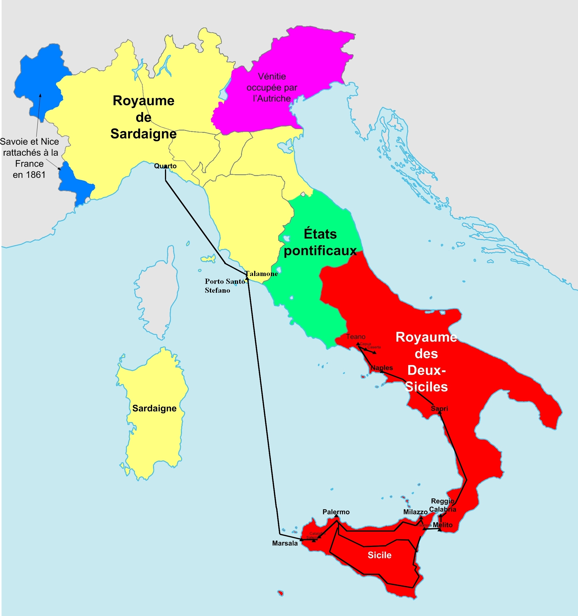 carte de la péninsule italienne et parcours de l'expédition des Mille